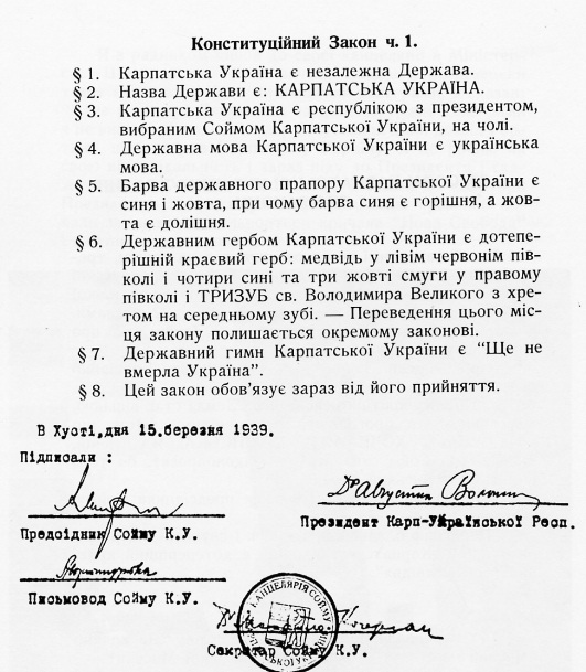 Зображення Конституційного закону Карпатської України №1